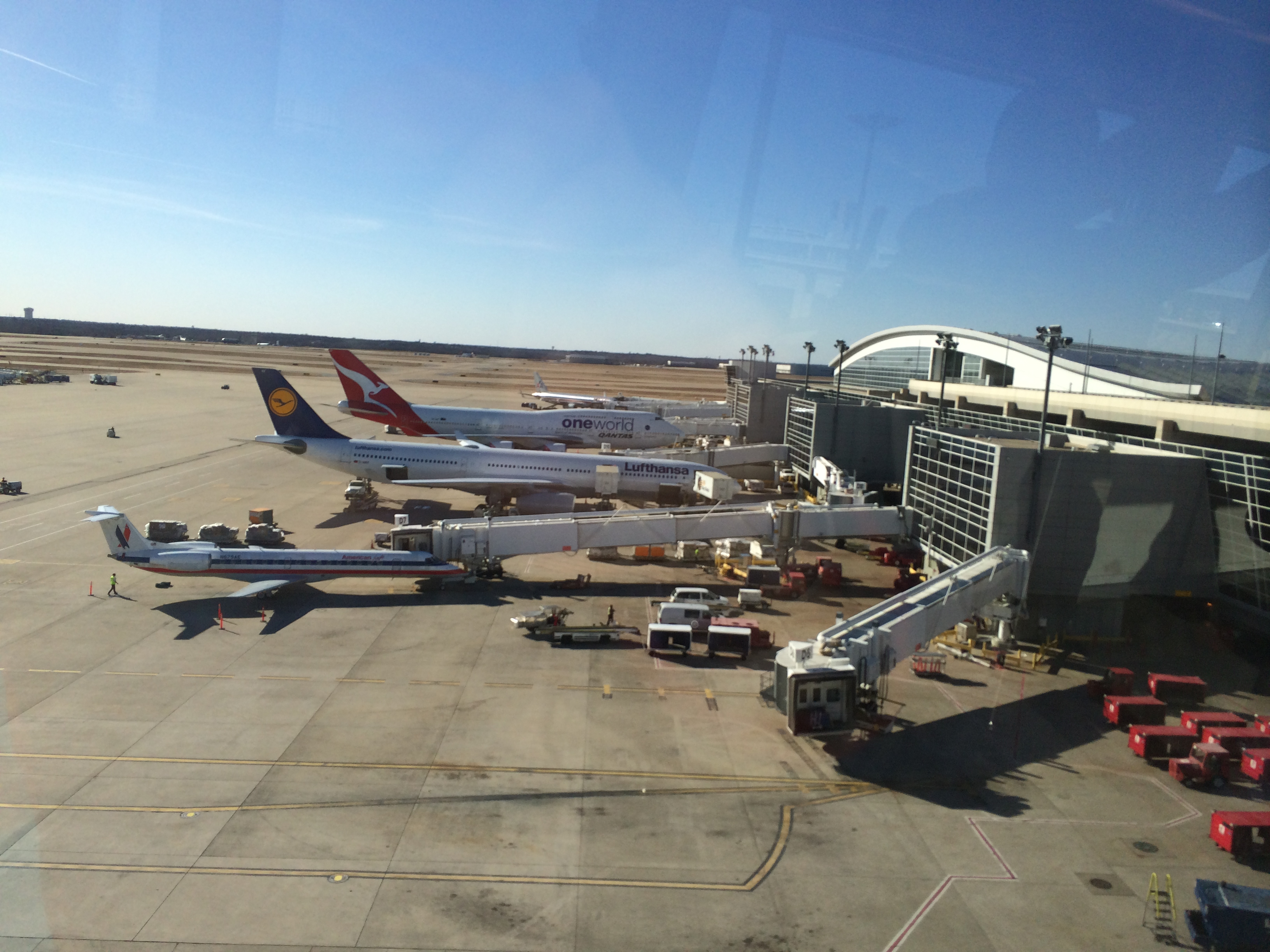 Terminal D del aeropuerto de DFW.